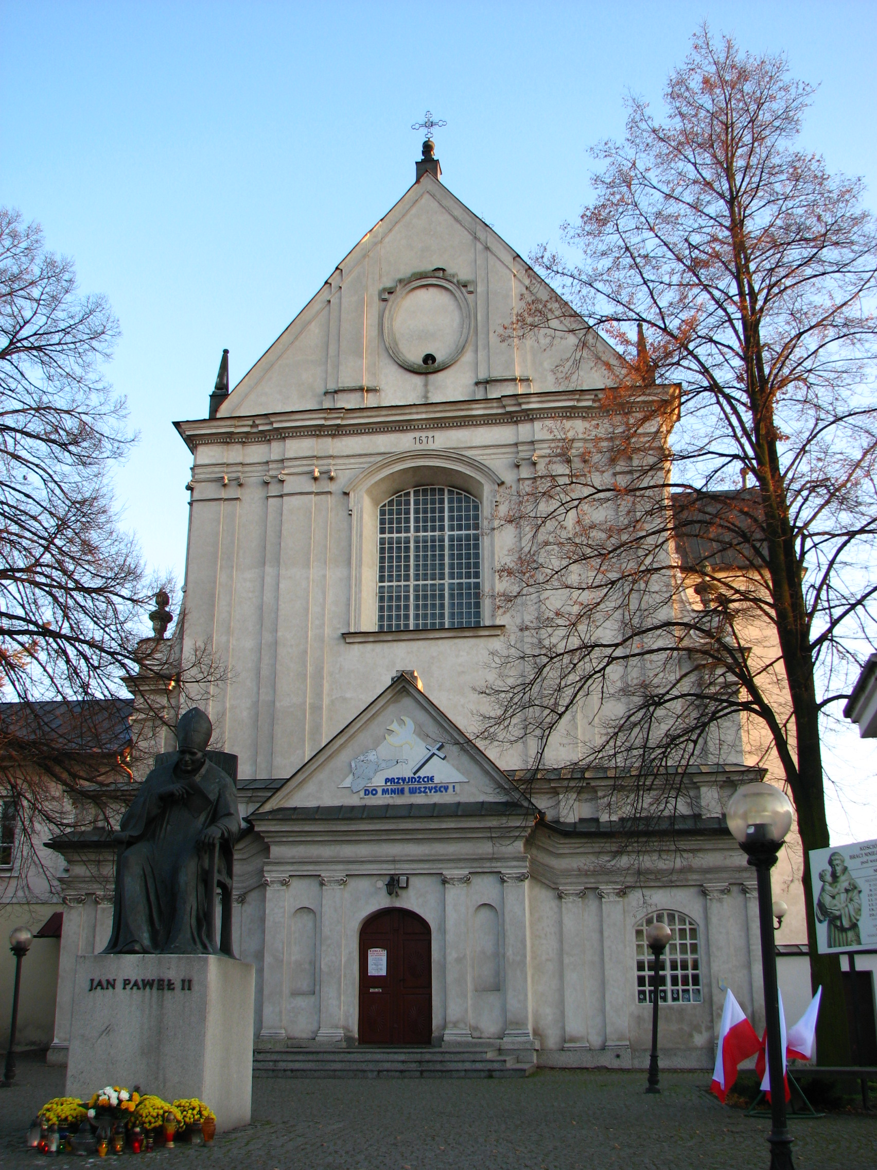 Kościół pw. Świętego Antoniego w Białej Podlaskiej.